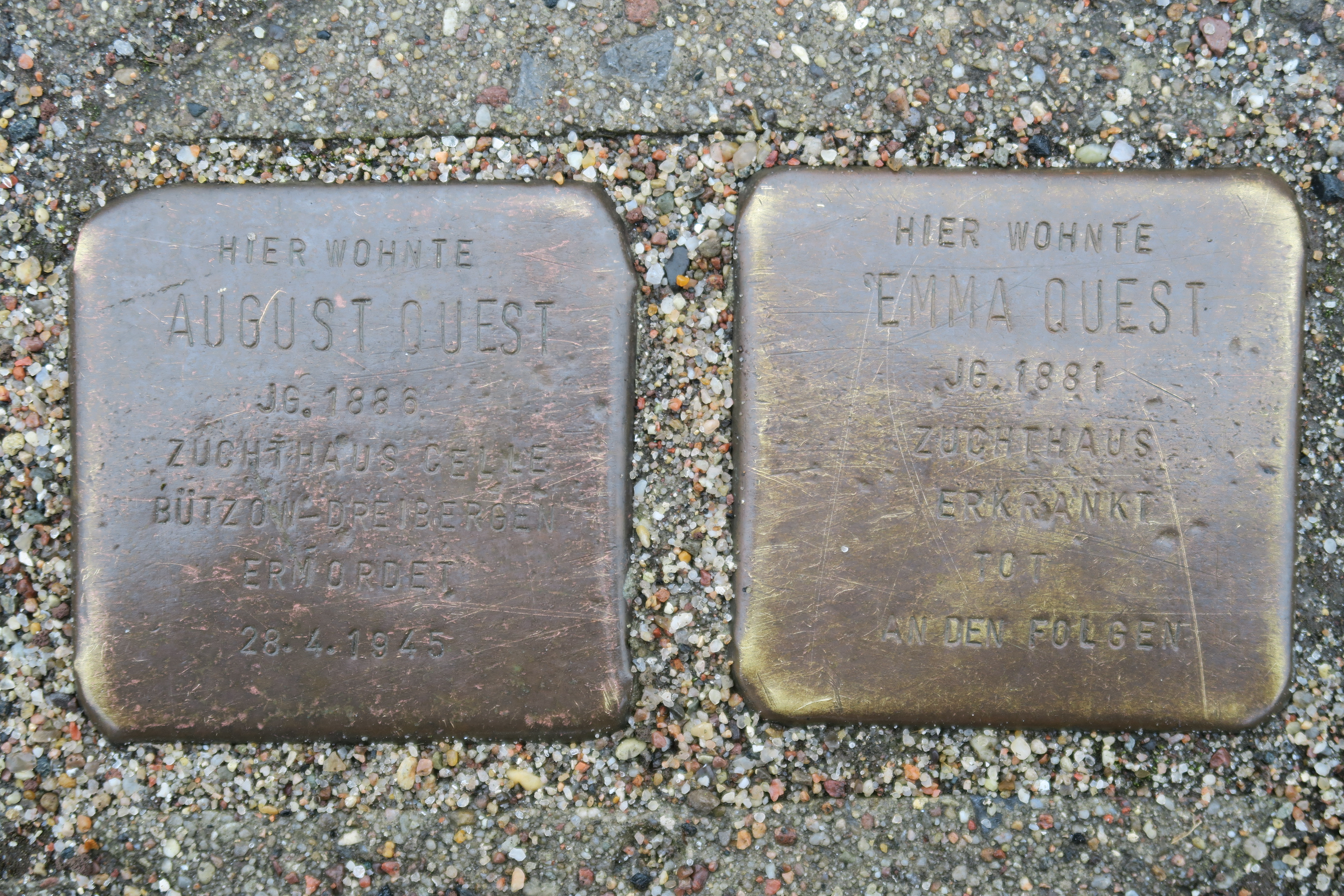 Stolpersteine für die Familie Quest in Hamburg-Wilstorf